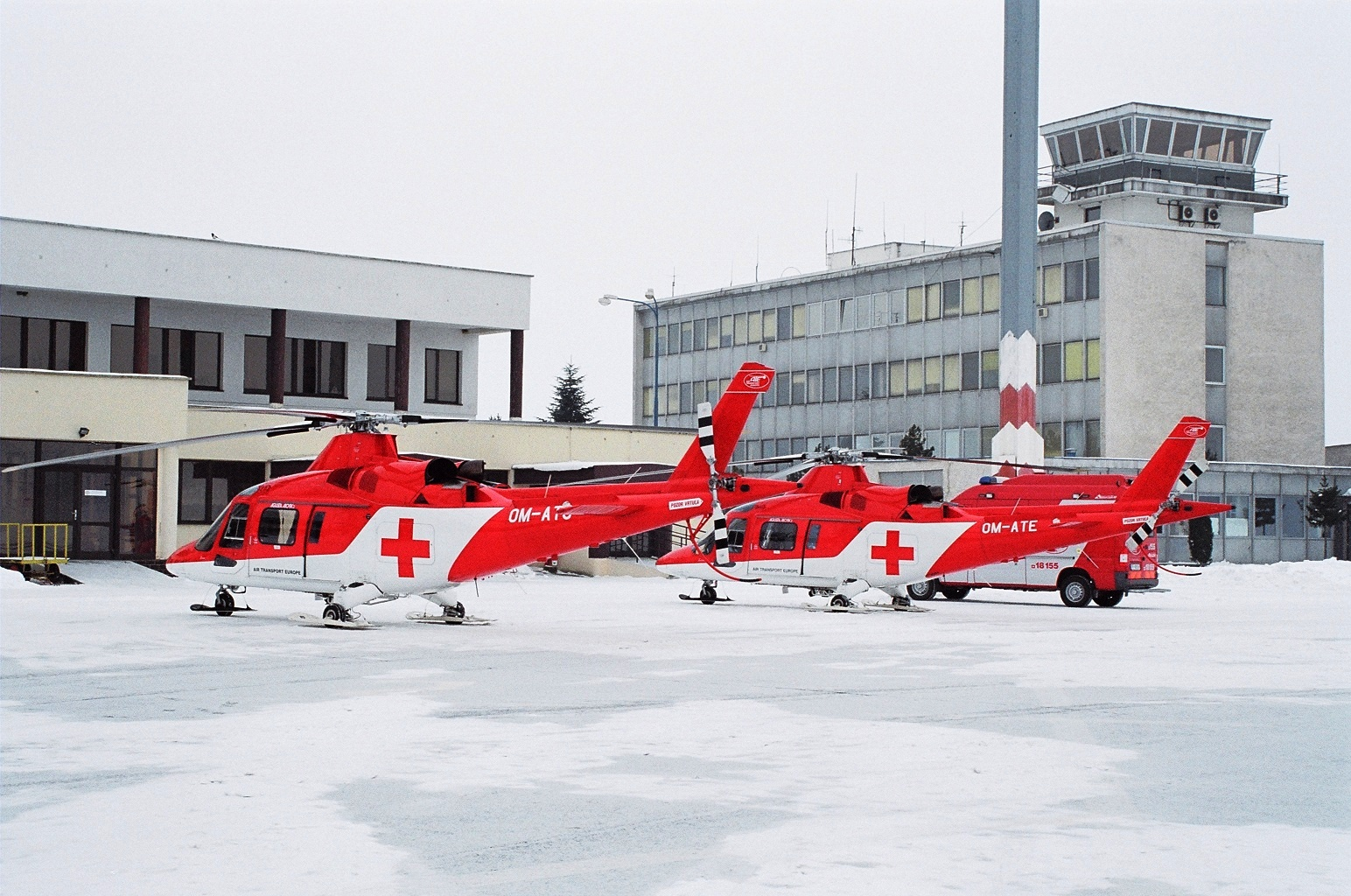 Agusty A109K2 na letisku Poprad - Tatry